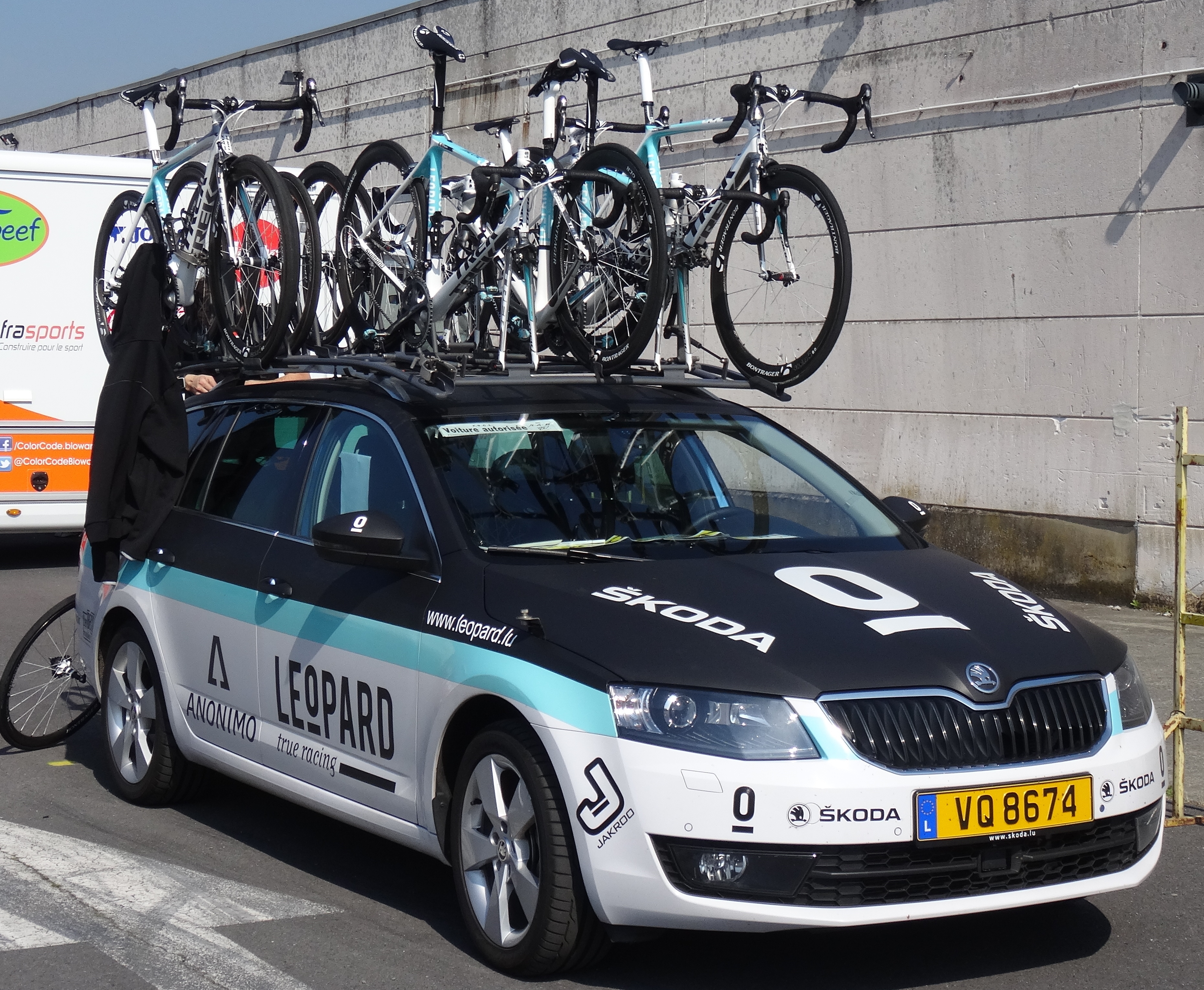 Reportage réalisé le samedi 17 mai à l'occasion du départ du Grand Prix Criquielion 2014 à Boussu, Belgique.